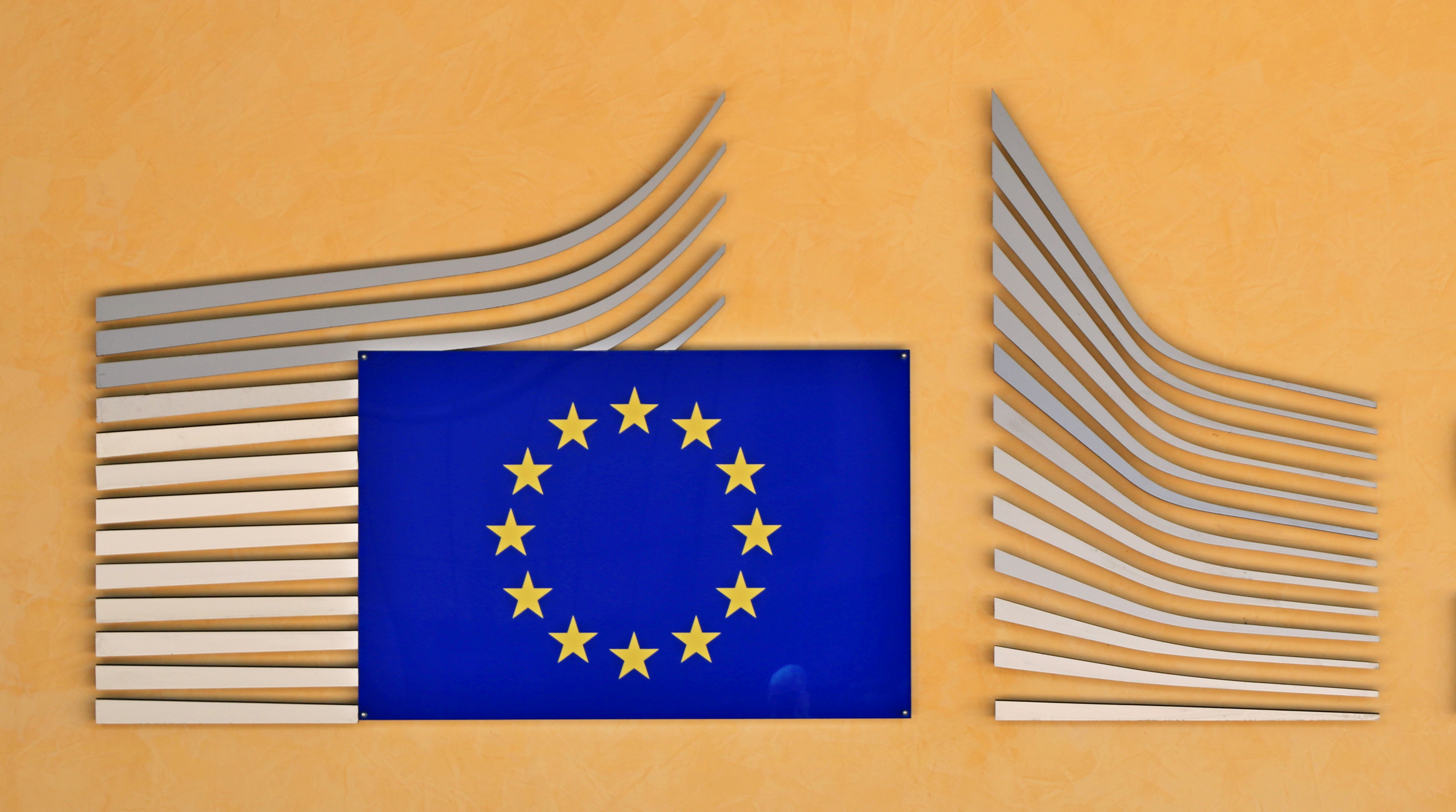 Belgique - Bruxelles - Schuman - Berlaymont - Symbole de la Commission européenne